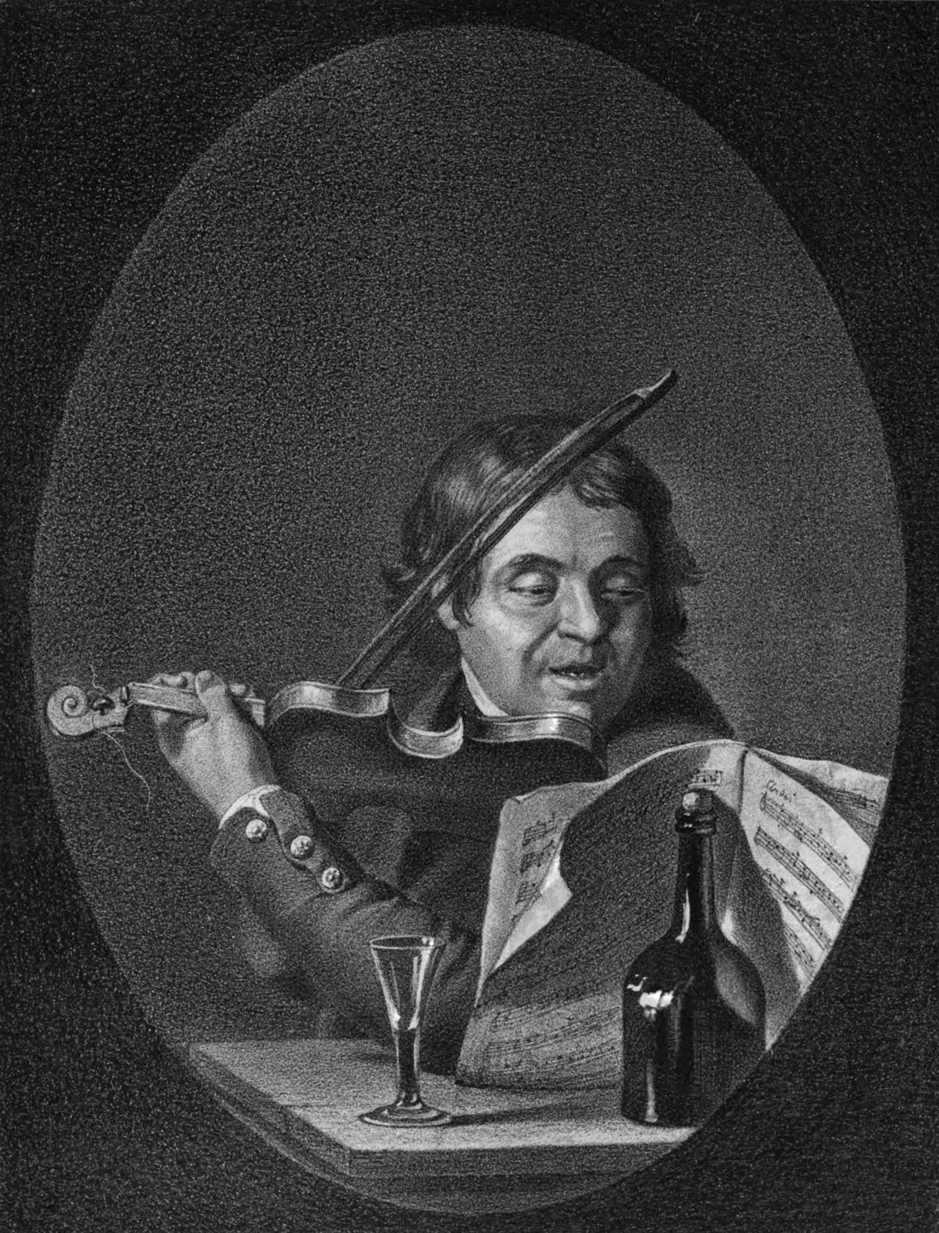 Litografi efter Fredman av Pehr Hilleström.